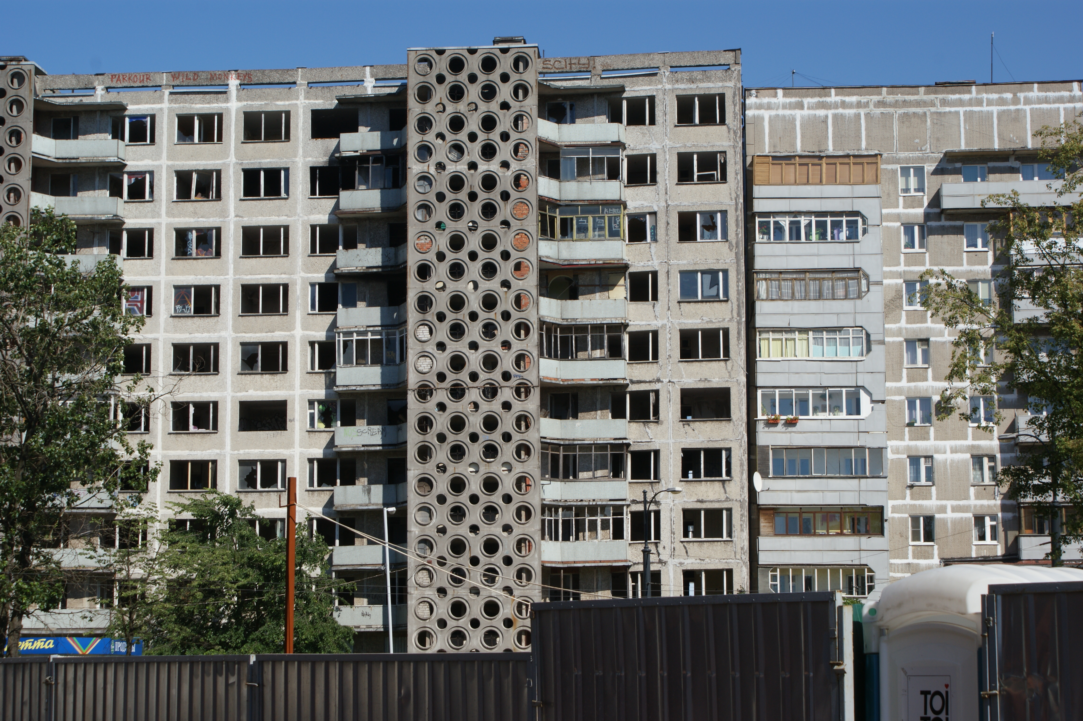 Maroder Wohnblock in Kaliningrad, Oktjabrskaja Strasse, gegenüber Fischdorf